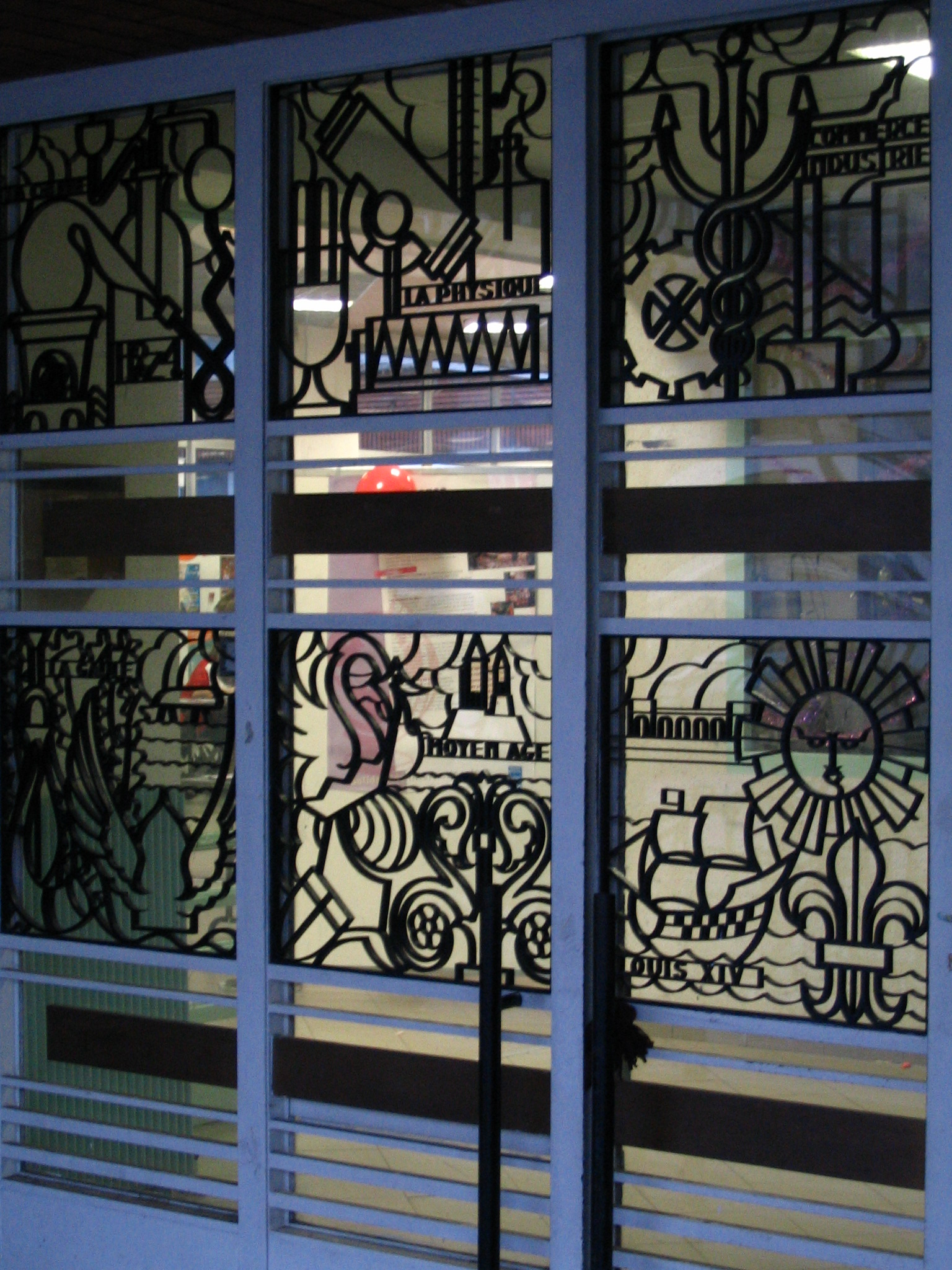 Groupe scolaire Jules Ferry - Maisons-Alfort - France 1932 - Grille de l'entrée par Poillerat Auteur/Author: P.Charpiat 2006